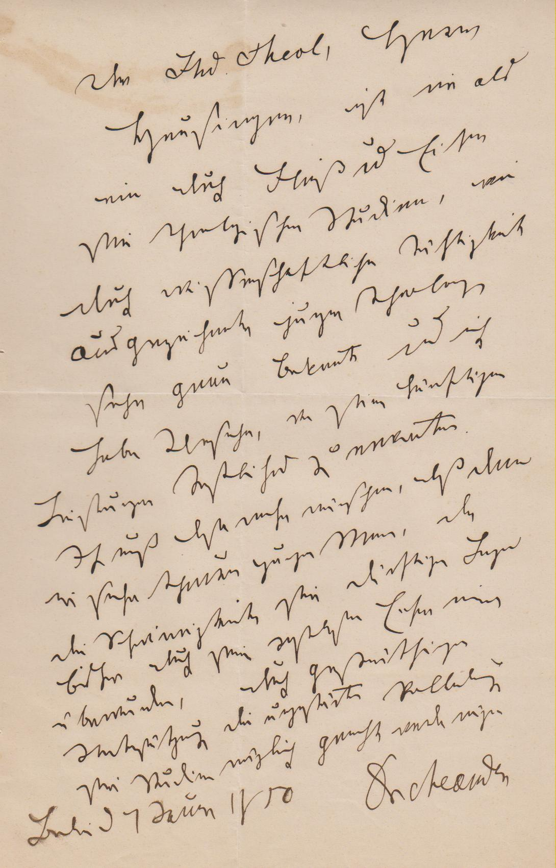 Autograph von August Neander, am 17. Januar 1850 in Berlin geschrieben, und zwar als Befürwortung für den Theologiestudenten Heinrich August Heußinger, um ihm bei seinen Schwierigkeiten (Geldsorgen) zu helfen.